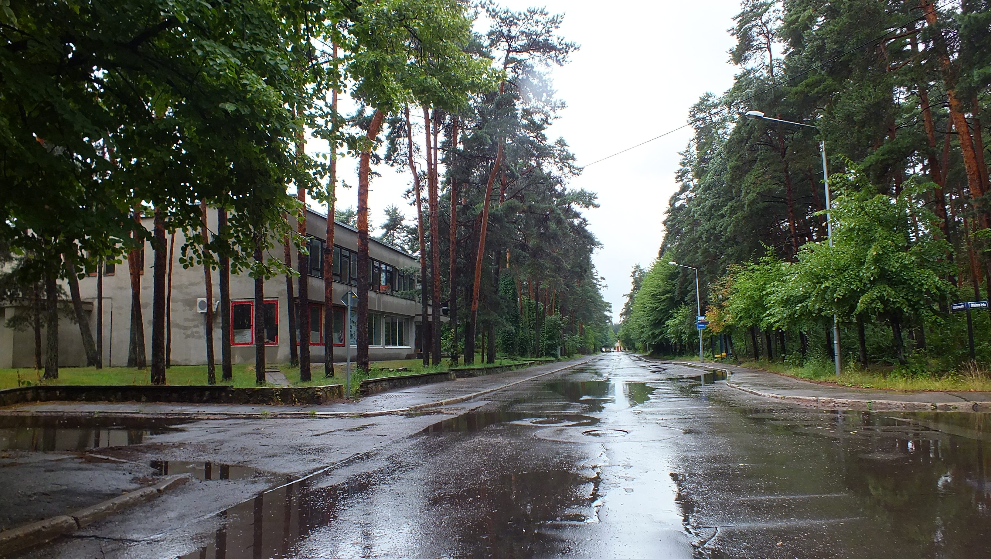 Lielais prospekts Priedainē, Jūrmalā